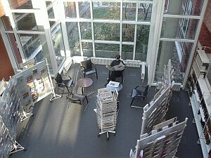 Lesesaal der Bibliothek der Friedrich-Ebert-Stiftung in Bonn